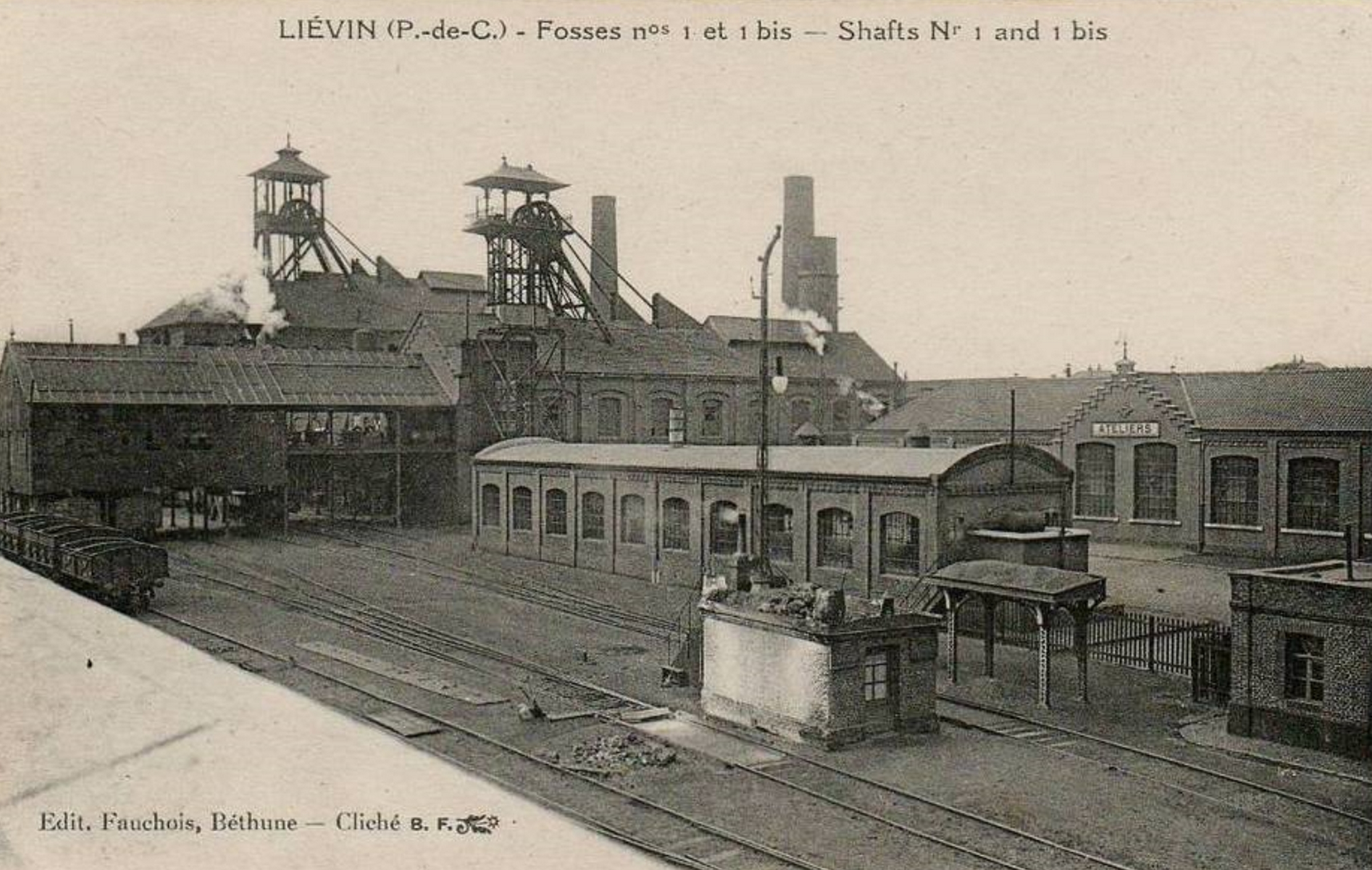 La Fosse n° 1 - 1 bis - 1 ter de la Compagnie des mines de Liévin était un charbonnage constitué de trois puits situé à Liévin, Pas-de-Calais, Nord-Pas-de-Calais, France.